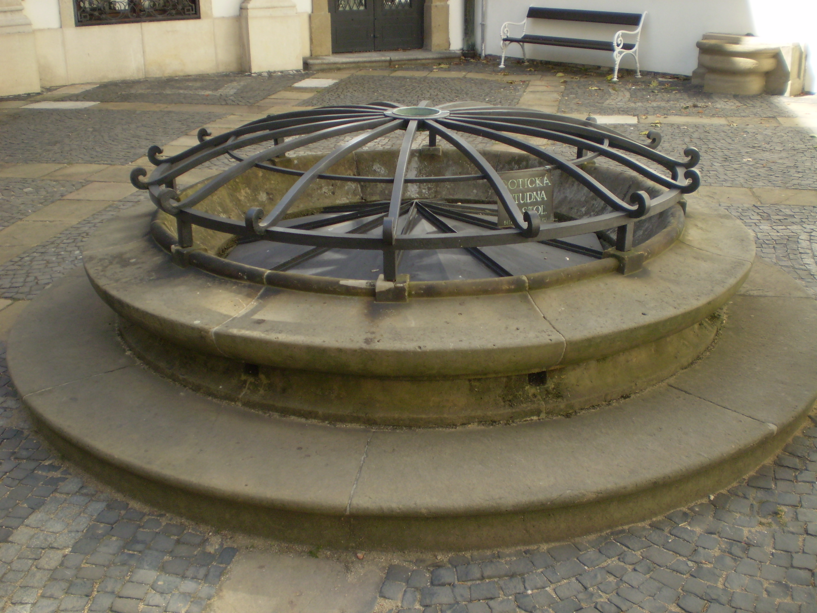 Gotická studna na nádvoří zámku Mikulov. Na tabulce s popiskem je napsáno: Gotická studna, 13. století. Hloubka 50 m.